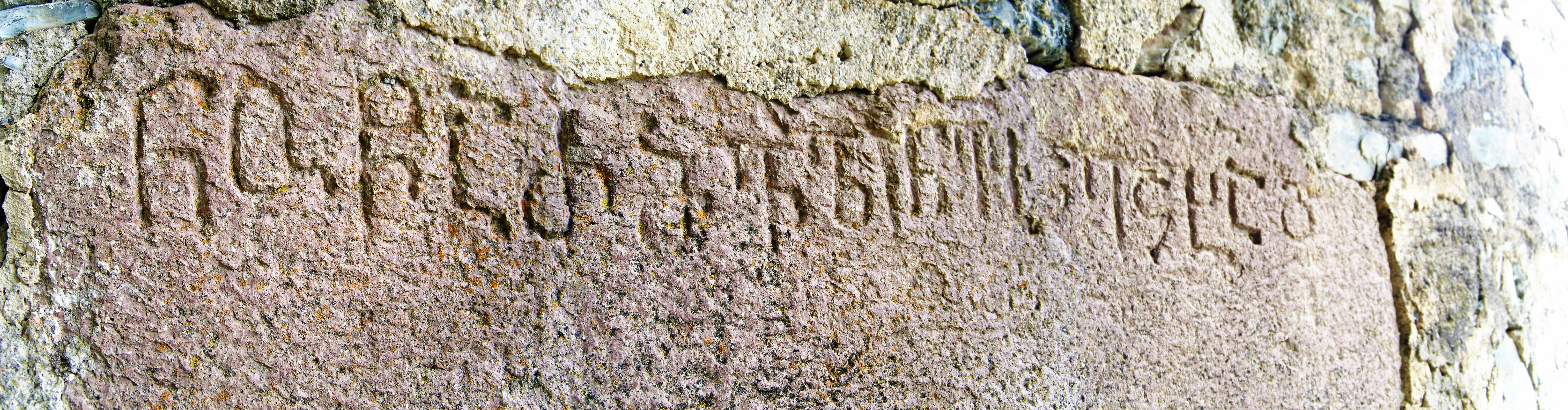 ღვთისმშობლის დარბაზული ეკლესიის წარწერა